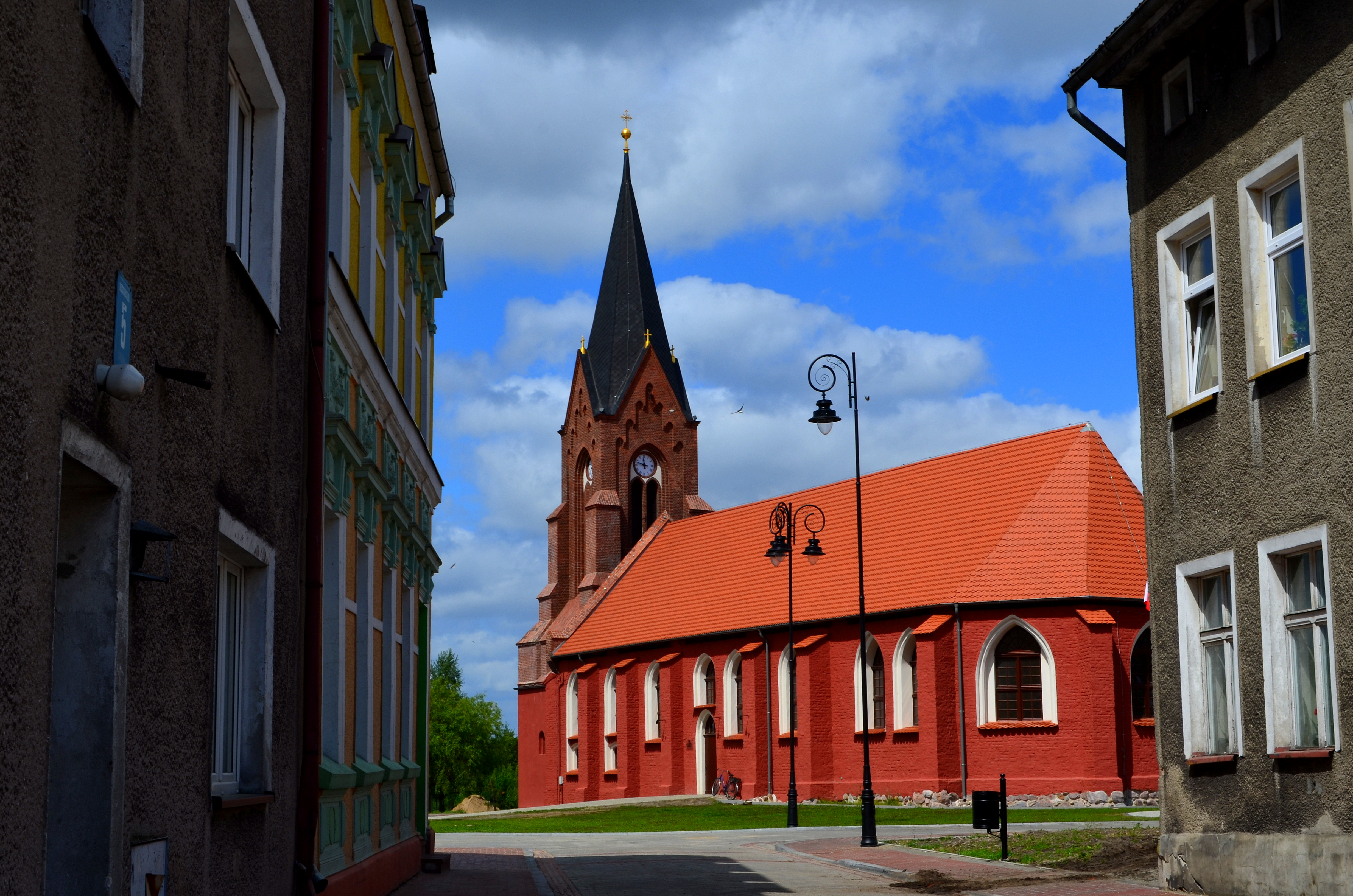 Kościół Wniebowzięcia Najświętszej Maryi Panny w Nowym Warpnie